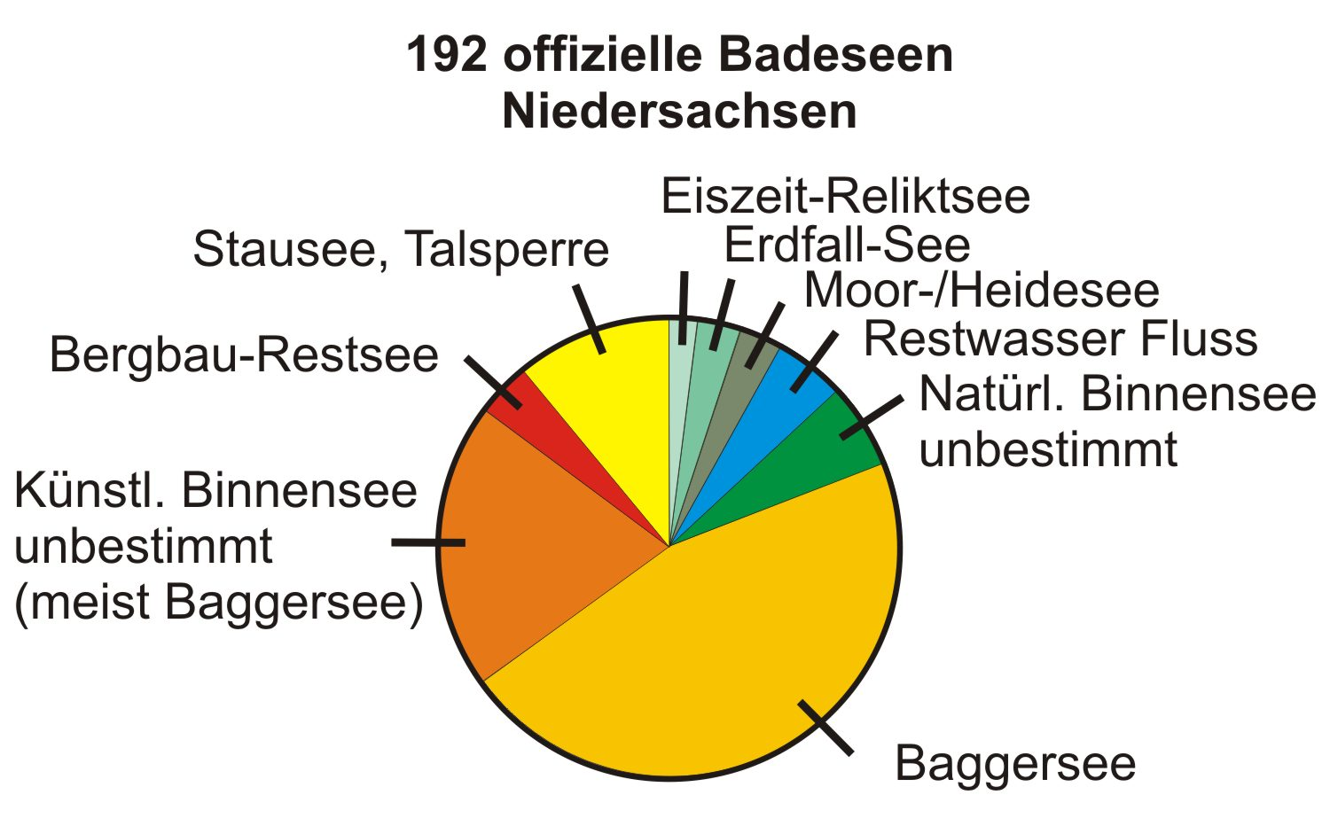 Badeseen in Niedersachsen, statistische Auswertung auf der Basis von 192 offiziellen Badeseen (Binnenseen mit gemeldeten und überwachten Badestellen) aus dem Badegewässer-Atlas Niedersachsen, Stand 30.10.2014. Nicht berücksichtigt wurden Badeseen, an denen das Baden offiziell verboten war, sowie Küstengewässer, Übergangsgewässer und Flussbadestellen. Die Zahl der Binnensee-Badestellen im Atlas lag mit 216 höher, weil pro See nur eine Badestelle in der Statistik berücksichtigt wurde. Daten: 36 Natürlich gesamt, davon 4 Eiszeitlicher Reliktsee, 5 Erdfall, 5 Moorsee, 10 Altwasser, Seeartige Flusserweiterung, 12 Natürlich unbestimmt, 156 künstlich gesamt, davon 89 Baggersee, 8 Ziegelteich, Braunkohletagebau-Restsee, Torfabbau, 20 Talsperre, Stausee, Ehemaliges Hafenbecken, Mahlbusen, Künstlicher Fischteich, 39 Künstlich unbestimmt (fast alles Baggerseen). Grafik: F. Welter-Schultes